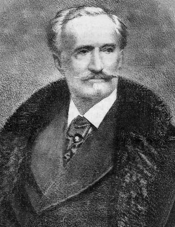 Фотография Эрнесто Каваллини